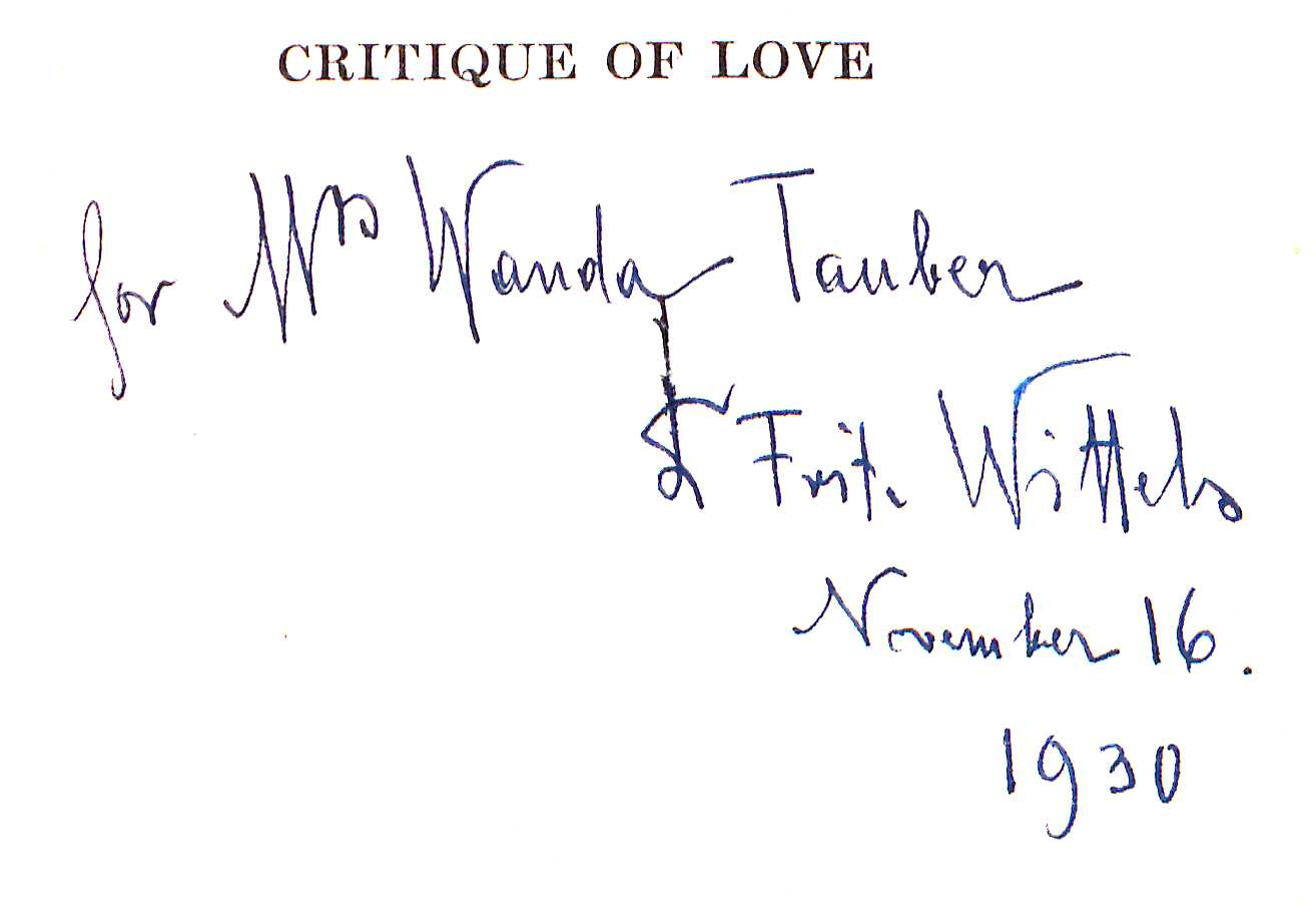 Fritz Wittels Autograph 1930 Wanda Tauber